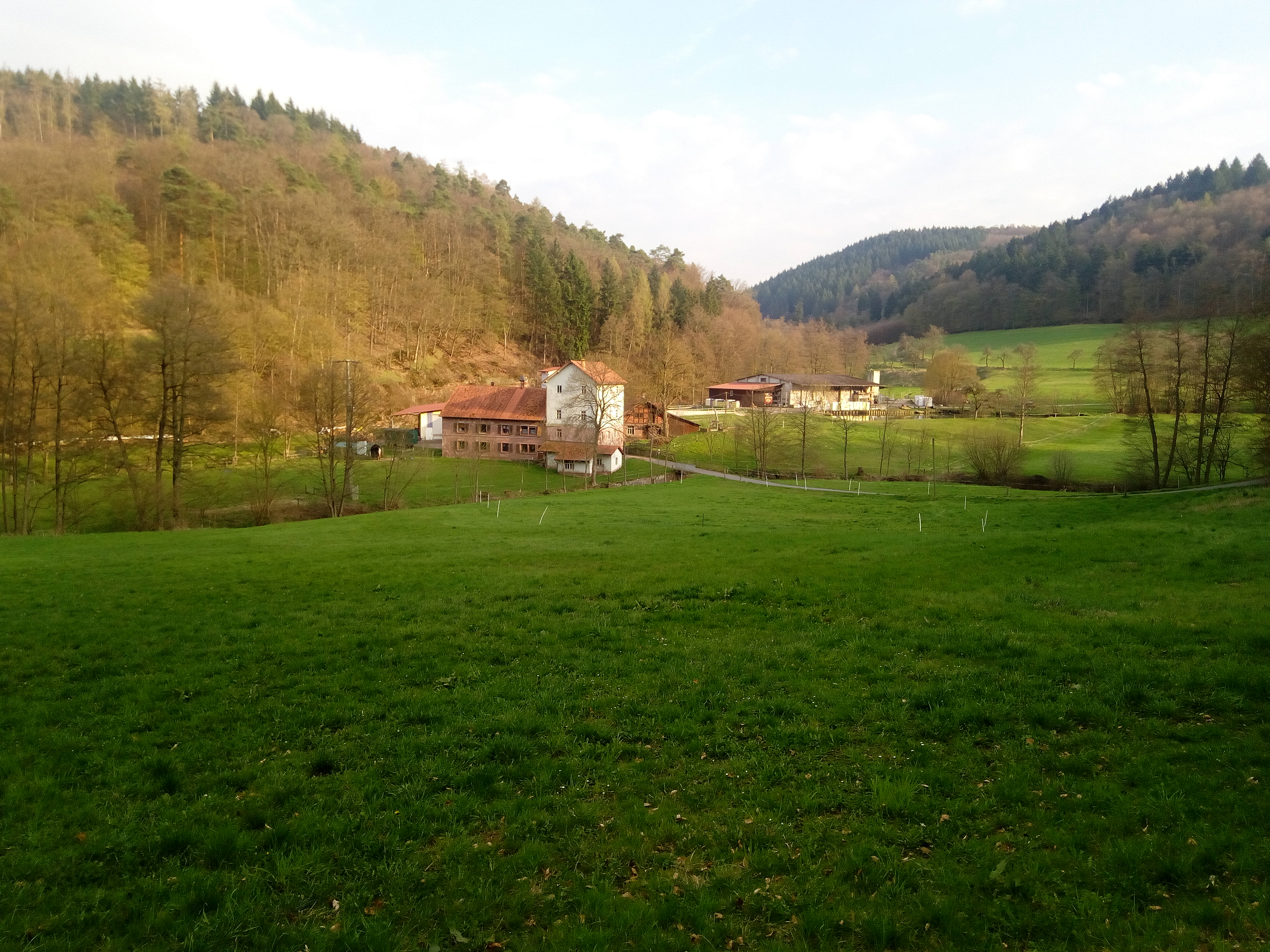 Wohnplatz Spritzenmühle